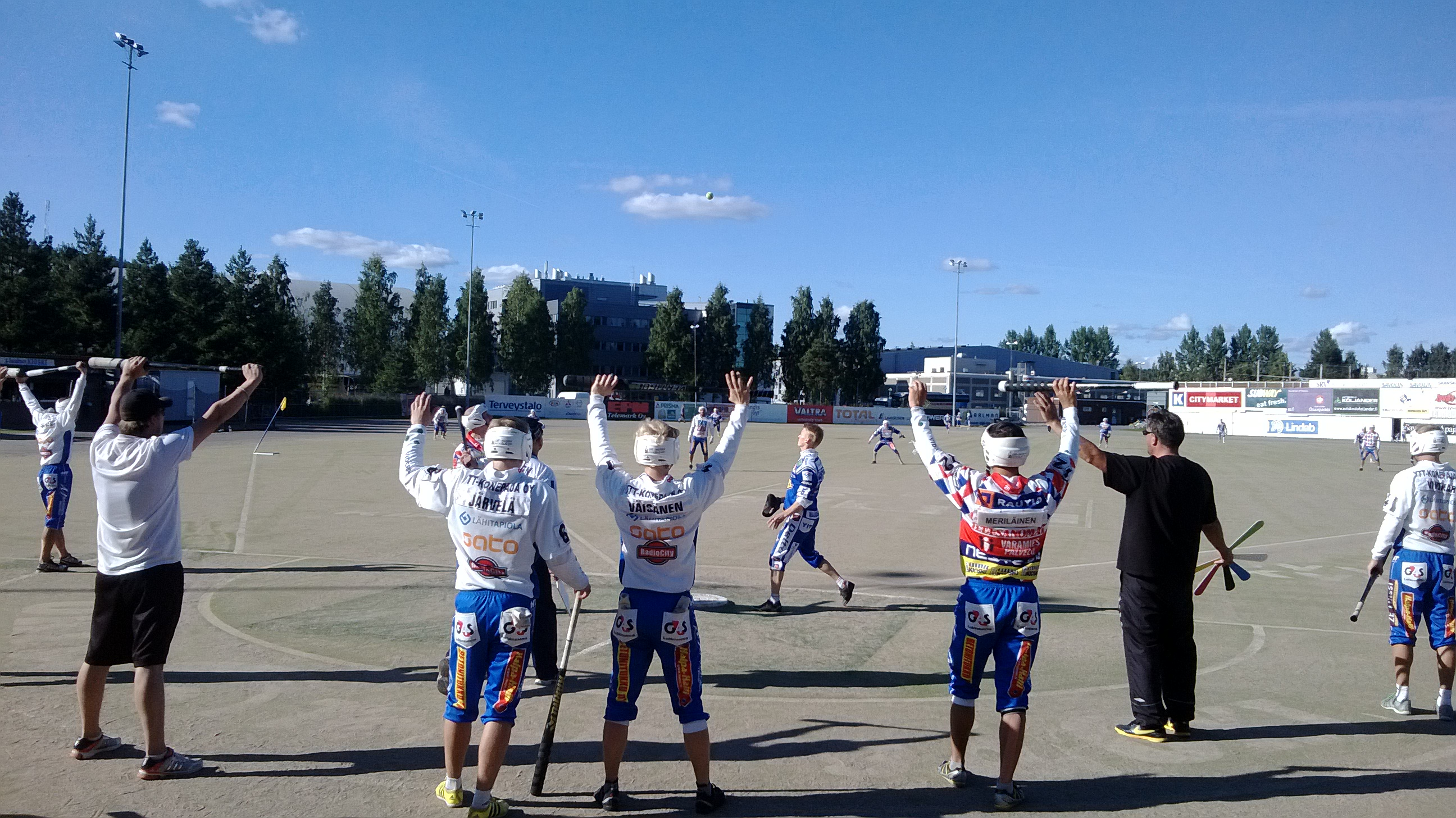 Pesäpallon ratkaiseva SM-karsintasarjan ottelu Jyväskylän Kiri - Oulun Lippo. Elokuu 2013, Jyväskylän Hippos